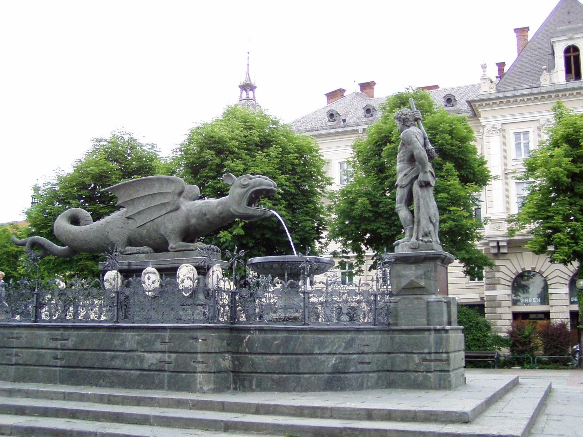 Lindwurmbrunnen at Neuer Platz in Klagenfurt